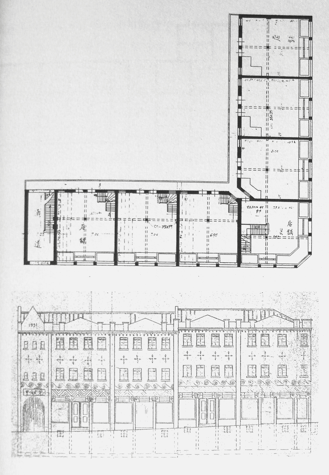 四方路九如里设计图